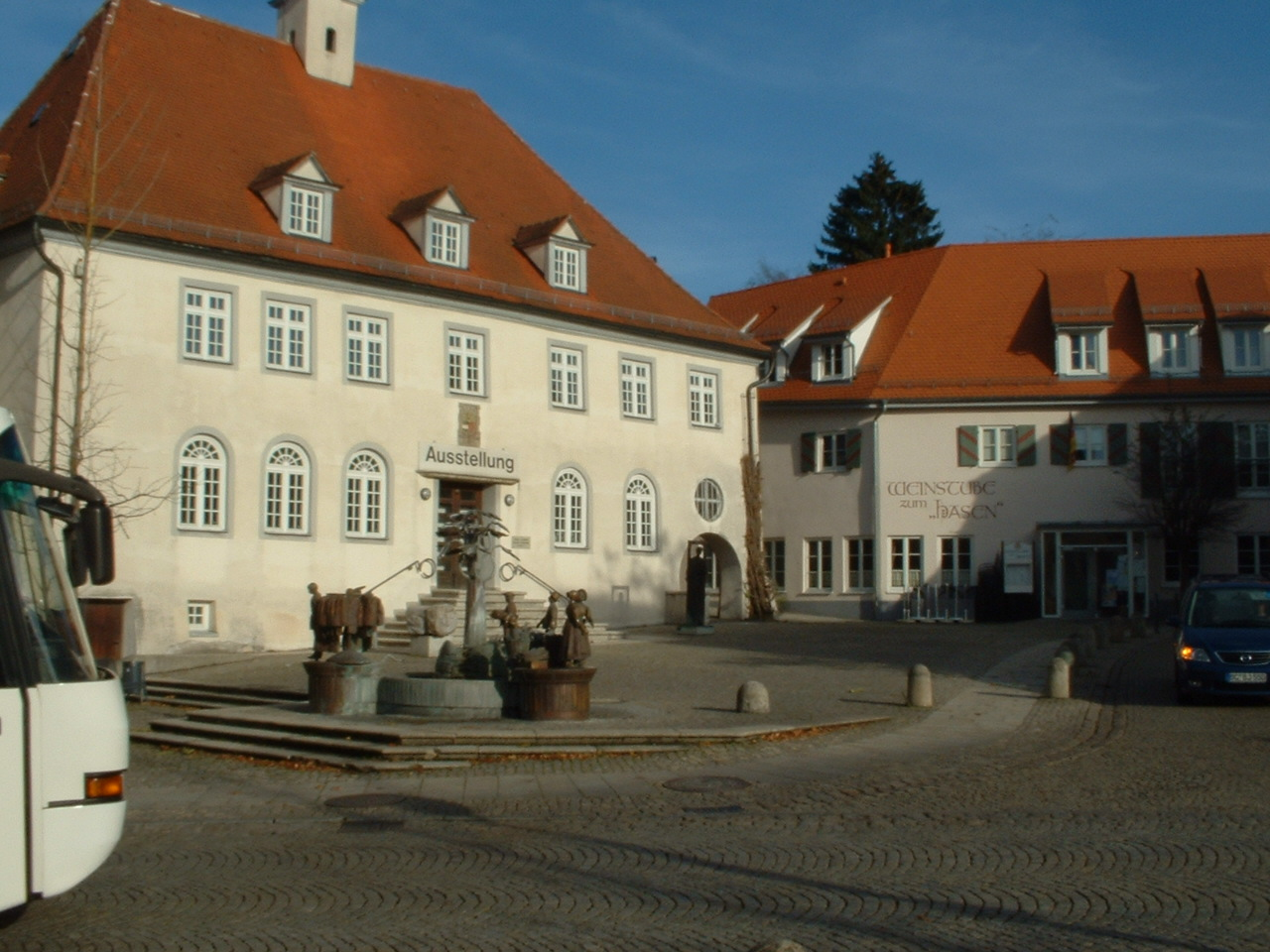 Laupheim, Schranne (granary)